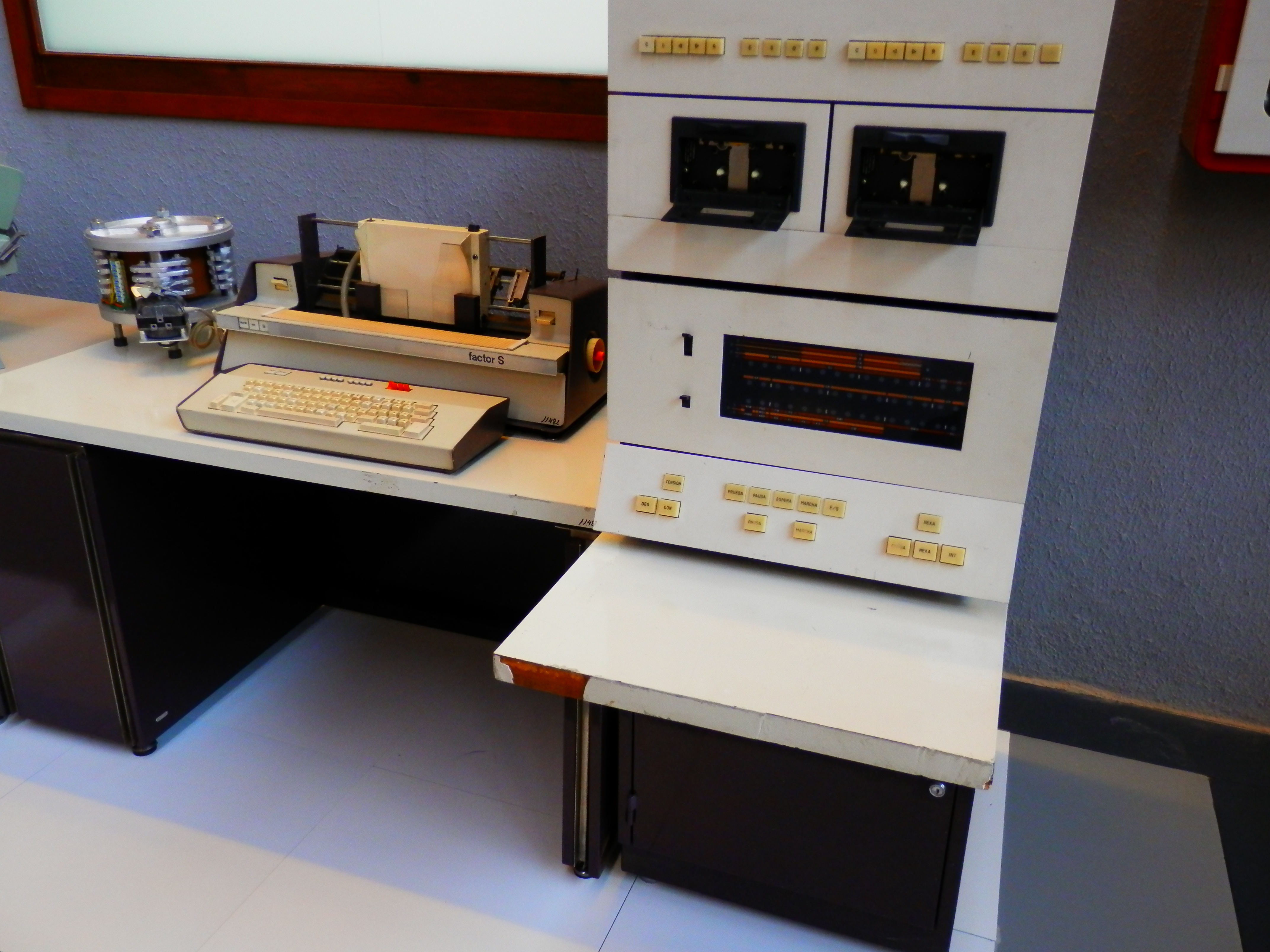 Un dels primers models de l'empresa Telesincro. Amb memòria central de nuclis de ferrita de 32 registres de 16 dígits. Podia disposar d'una memòria addicional de 3.200 posicions de 6 bits per guardar constants alfanumèriques.